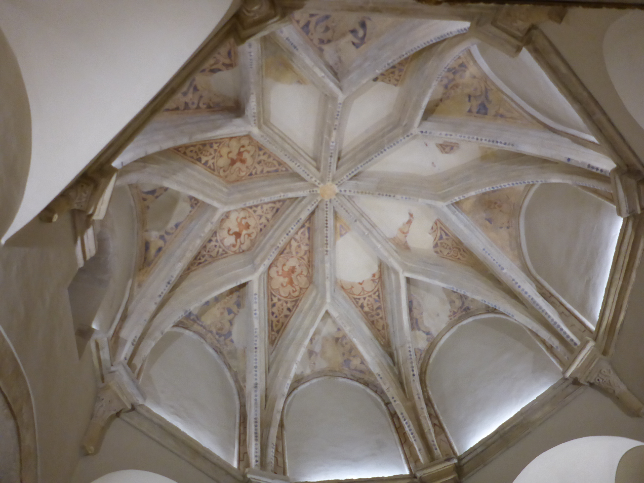 Interior de la Iglesia Church of San Juan de los Caballeros, Jerez de la Frontera (España)